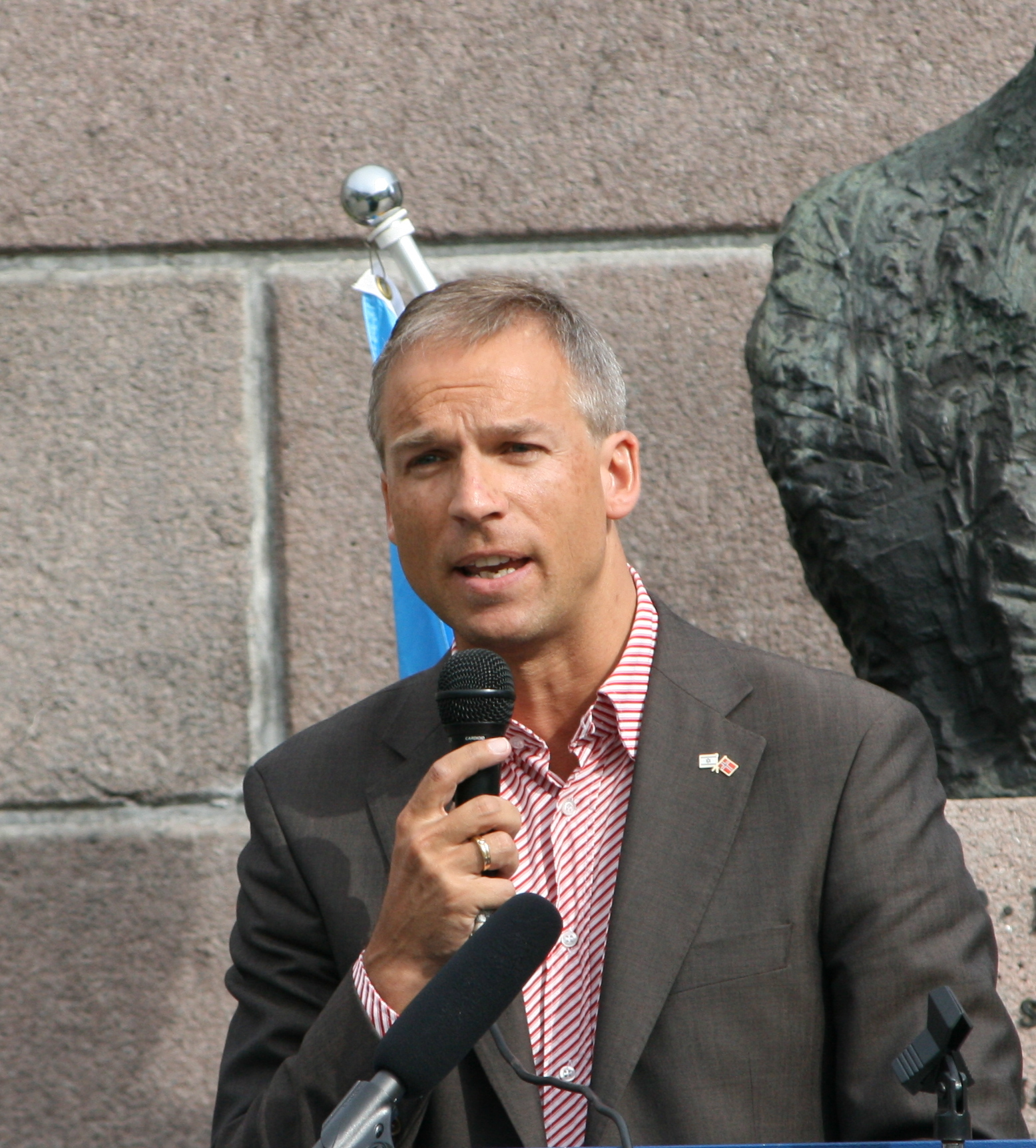 Hans Olav Syversen, KrF-politiker